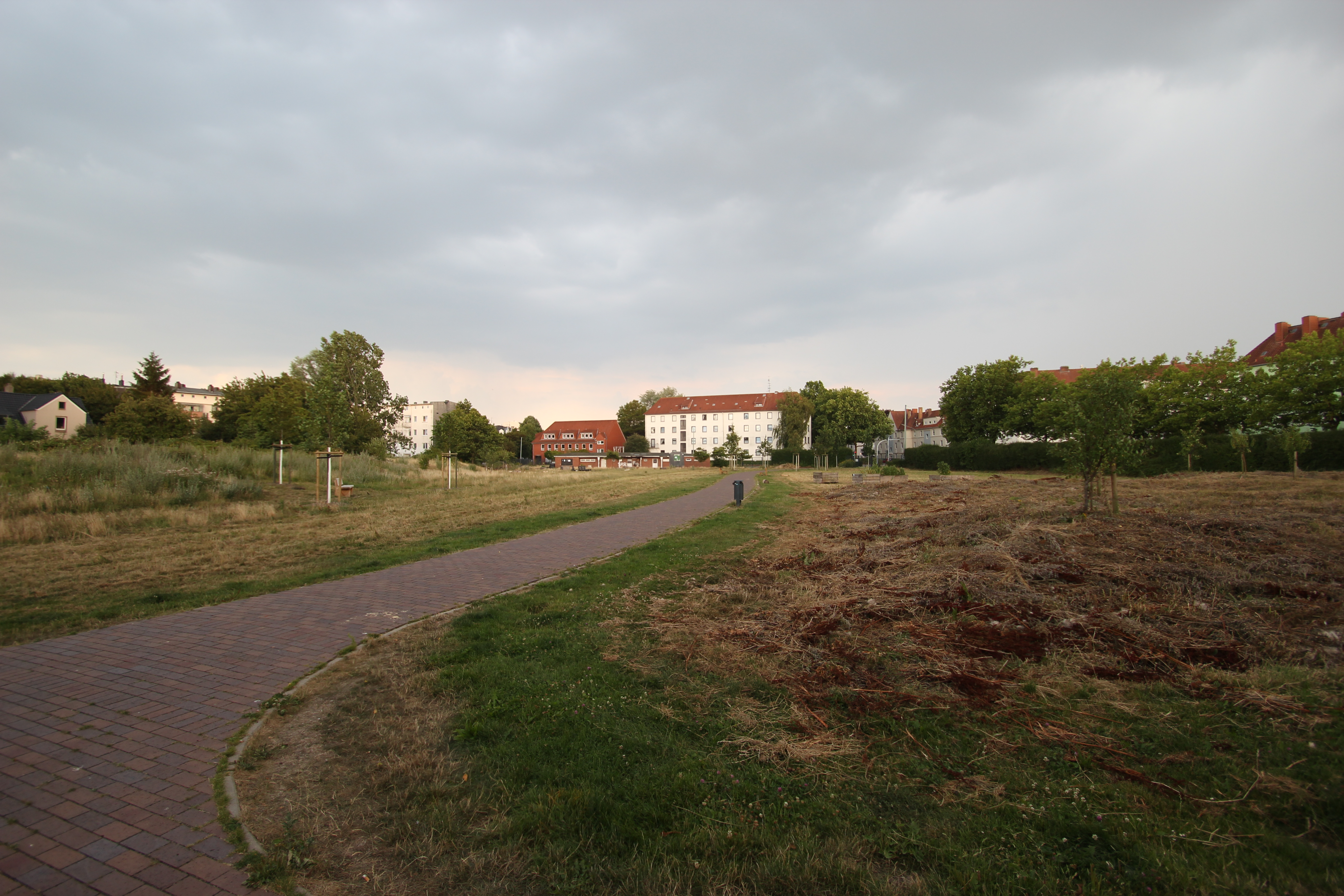 Zum Park- und Freizeitgelände umgebautes, ehemaliges Zollinlandstadion in Bremerhaven, Blick in südöstlicher Richtung